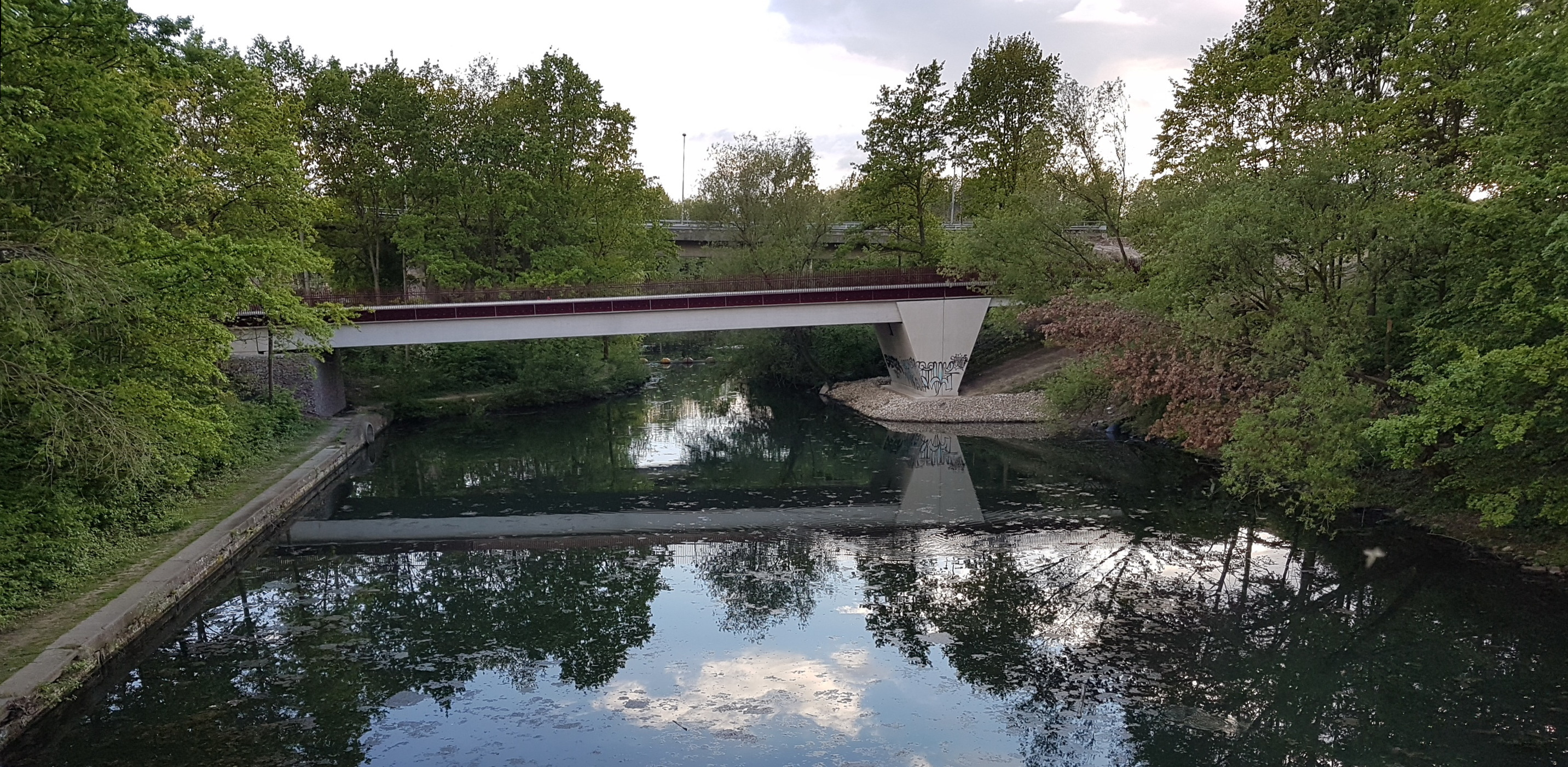 Zicht vanaf de Bosscherweg op de Frontenpadbrug over de Havenkom in Maastricht. De in 2019 gebouwde voetgangers- en fietsbrug verbindt het Frontenpark met het stadscentrum (Boschstraat).